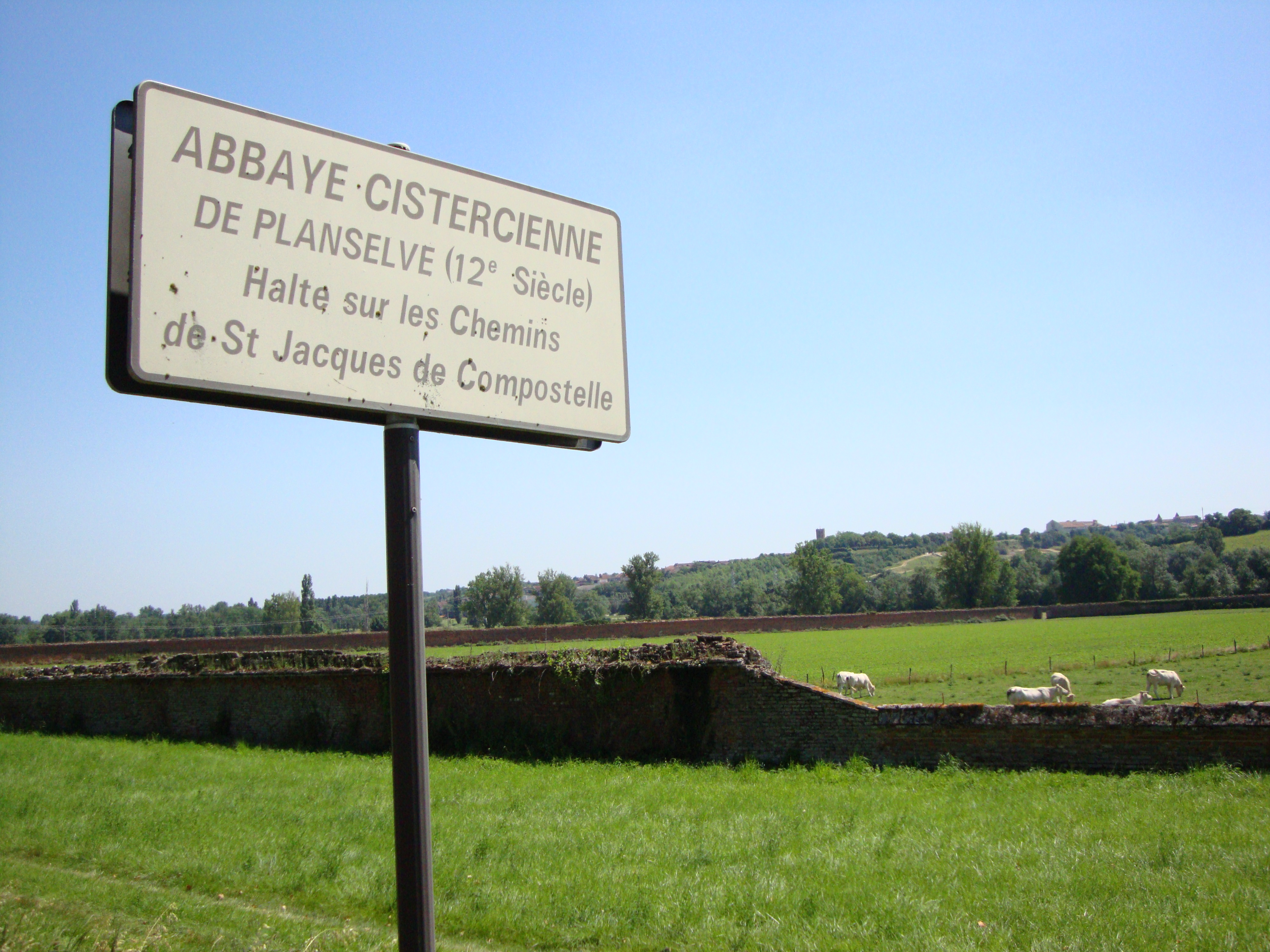 Gimont (Gers, Fr) plaque Abbaye de Planselve